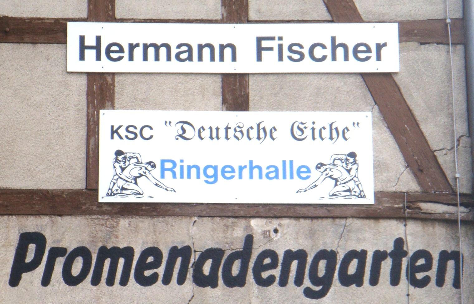 Ringerhalle "Hermann Fischer" in Apolda, 2010